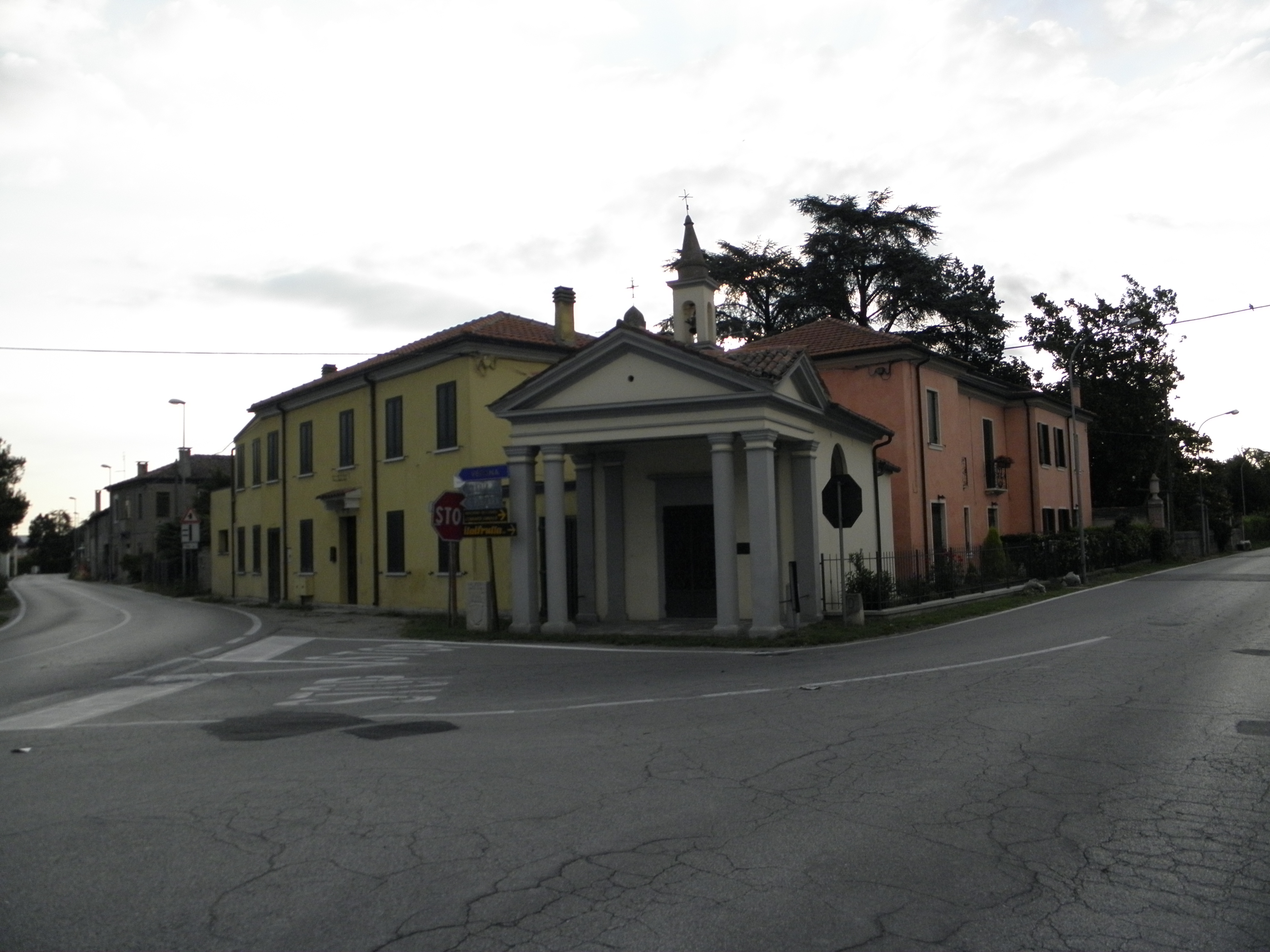 Fiesso Umbertiano, località detta alla Buca: l'oratorio della Beata Vergine del Rosario.